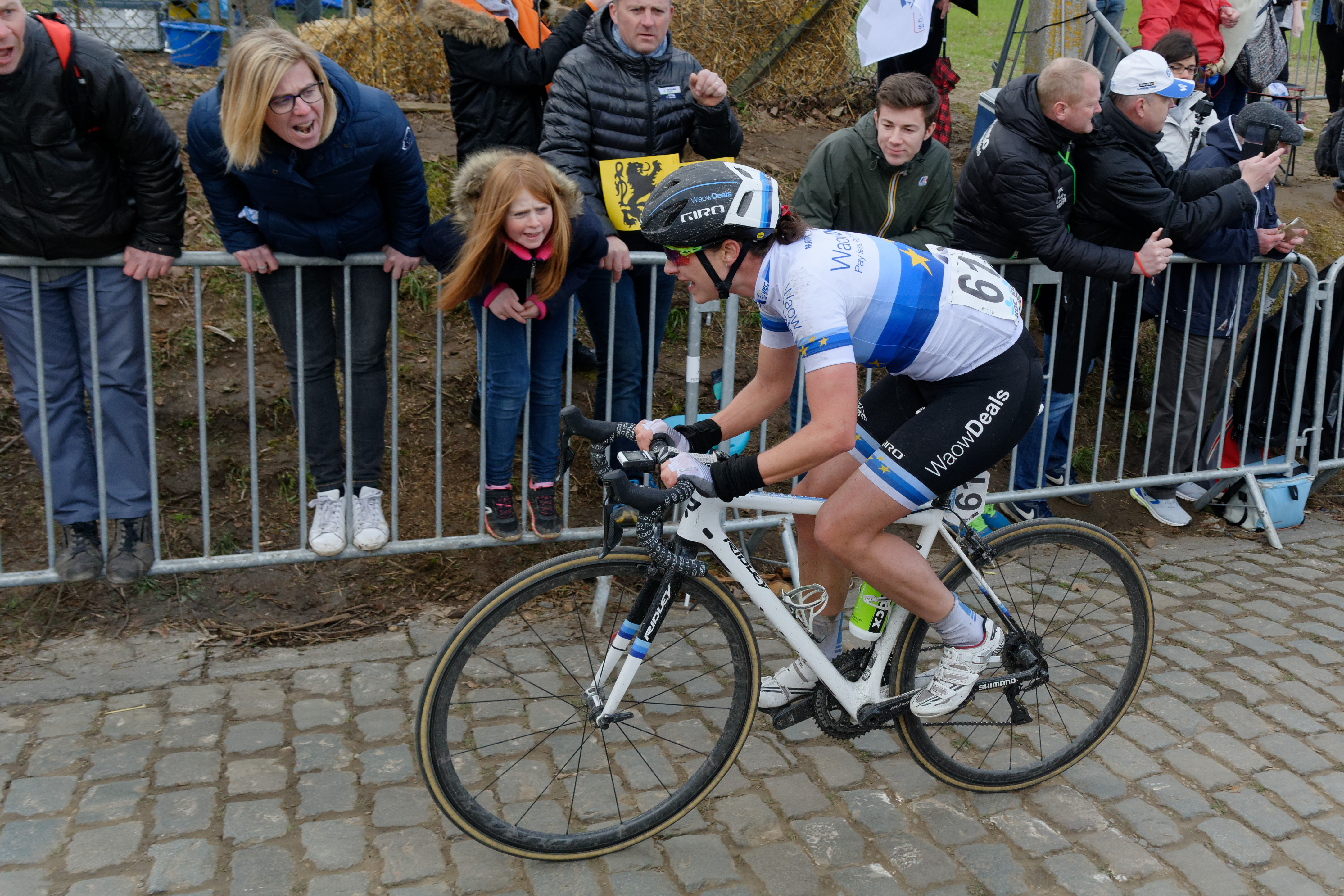 Ronde Van Vlaanderen 2018 / Tour of Flanders 2018 Oude Kwaremont